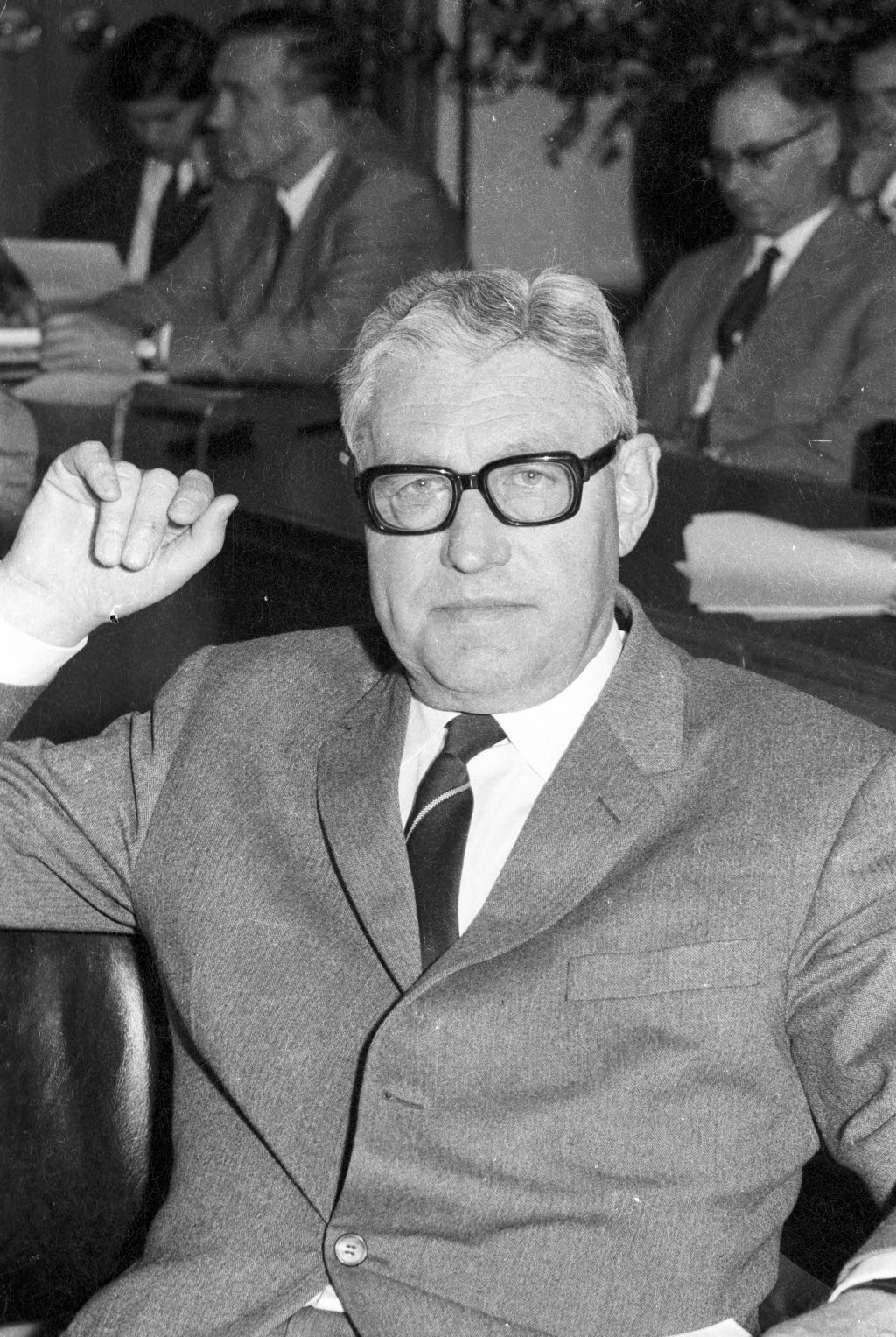 Stadtrat Hans-Carl Rüdel (CDU)